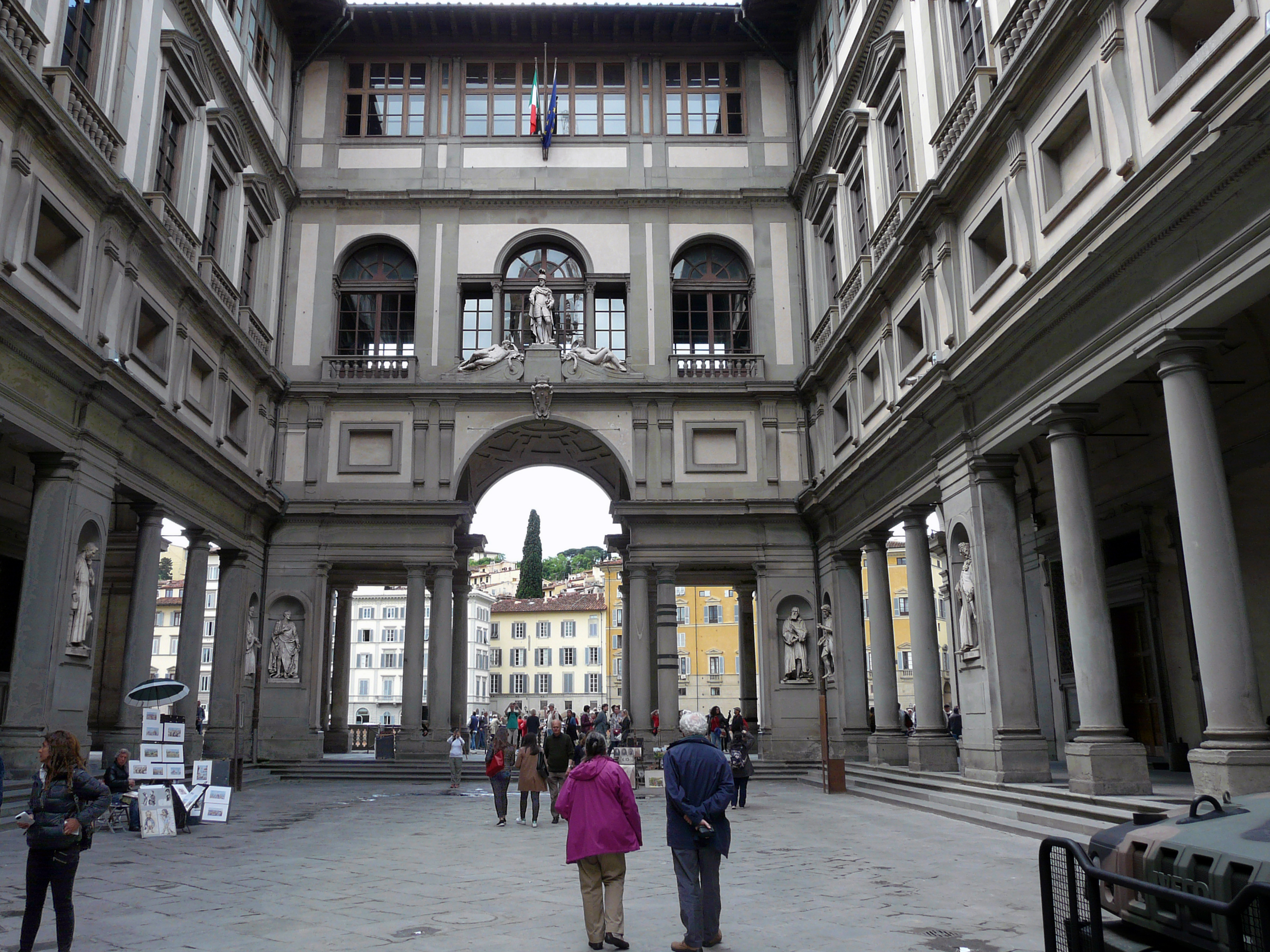 Двор с выходом на набережную